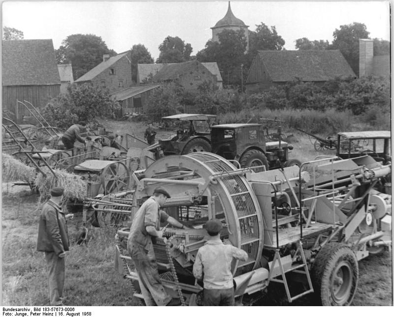 Pausin, Wartung eines Kartoffelernters Zentralbild Junge Vgt.-Nea16.8.1958 Stützpunkt Pausin der MTS Zoestow In Pausin, Kreis Nauen, befinden sich der Stützpunkt der Maschinen-Traktoren-Station Zoestow Es ist ein vorbildlich eingerichteter Stützpunkt, der über einen guten Maschinenpark verfügt UBz: Bevor die Kartoffelerntemaschine in Einsatz geht, wird noch einmal alles überprüft. V.r.n.l.: Bruno Thiel, Günther Hennig und Brigadier Alber Schreiber.